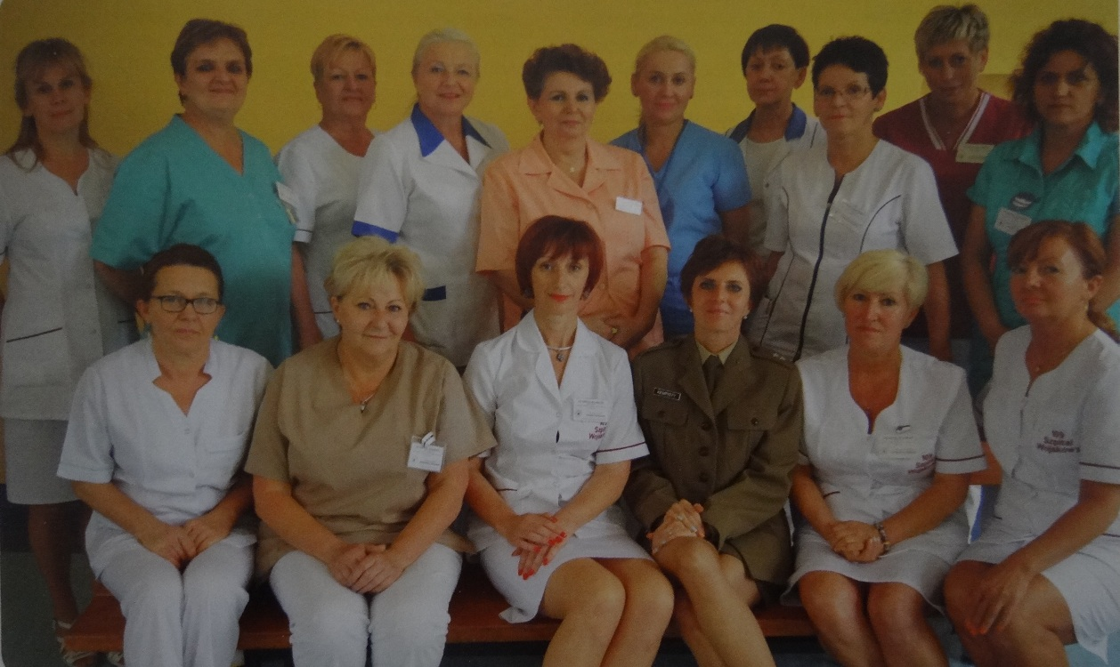 Szczecin, 2014 r. Naczelna Pielęgniarka 109 Szpitala Wojskowego mgr Katarzyna Grabowiecka w gronie pielęgniarek oddziałowych